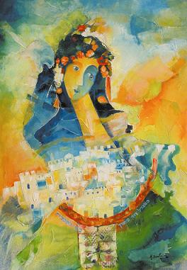 ציור שמן של הצייר אלברט בן חיים